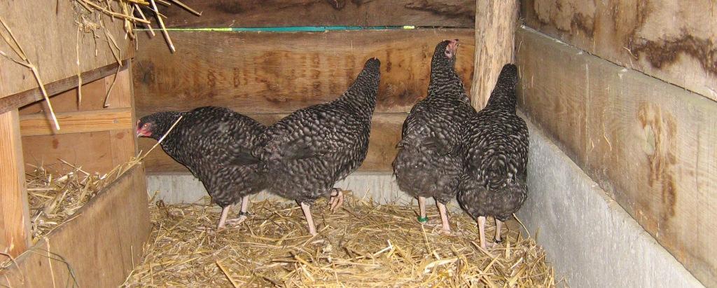 jonge hennen